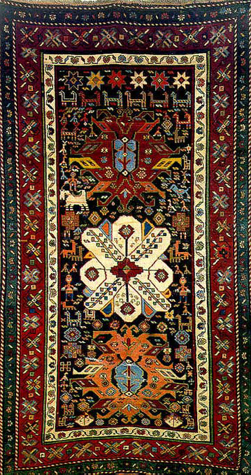 Армянский ковер из Еревана - 19 век